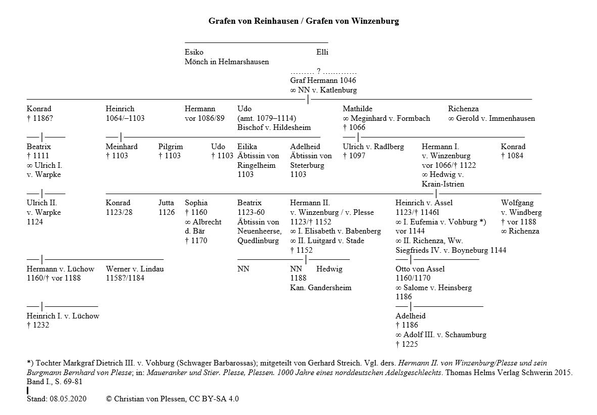 Stammtafel